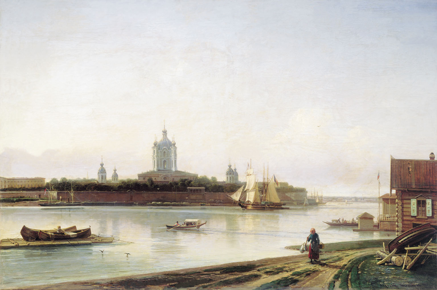 Smolny as seen from Bolshaya Okhtalabel QS:Lru,"Вид Смольного монастыря с Большой Охты." label QS:Len,"Smolny as seen from Bolshaya Okhta"